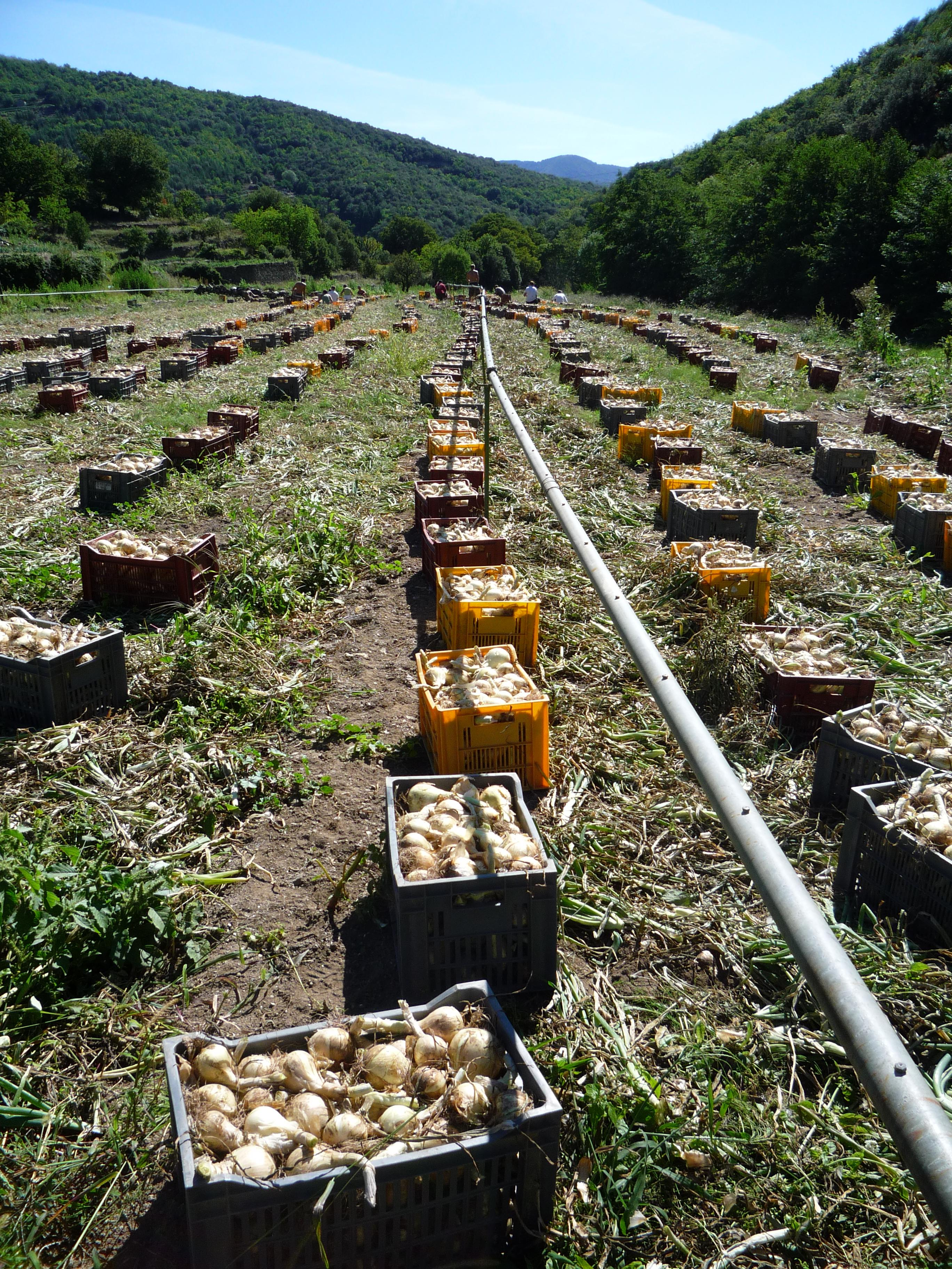 L'arrachage de l'Oignon Doux des Cévennes